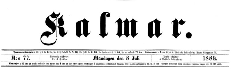 Tidningen Kalmar av den 8 juli 1889